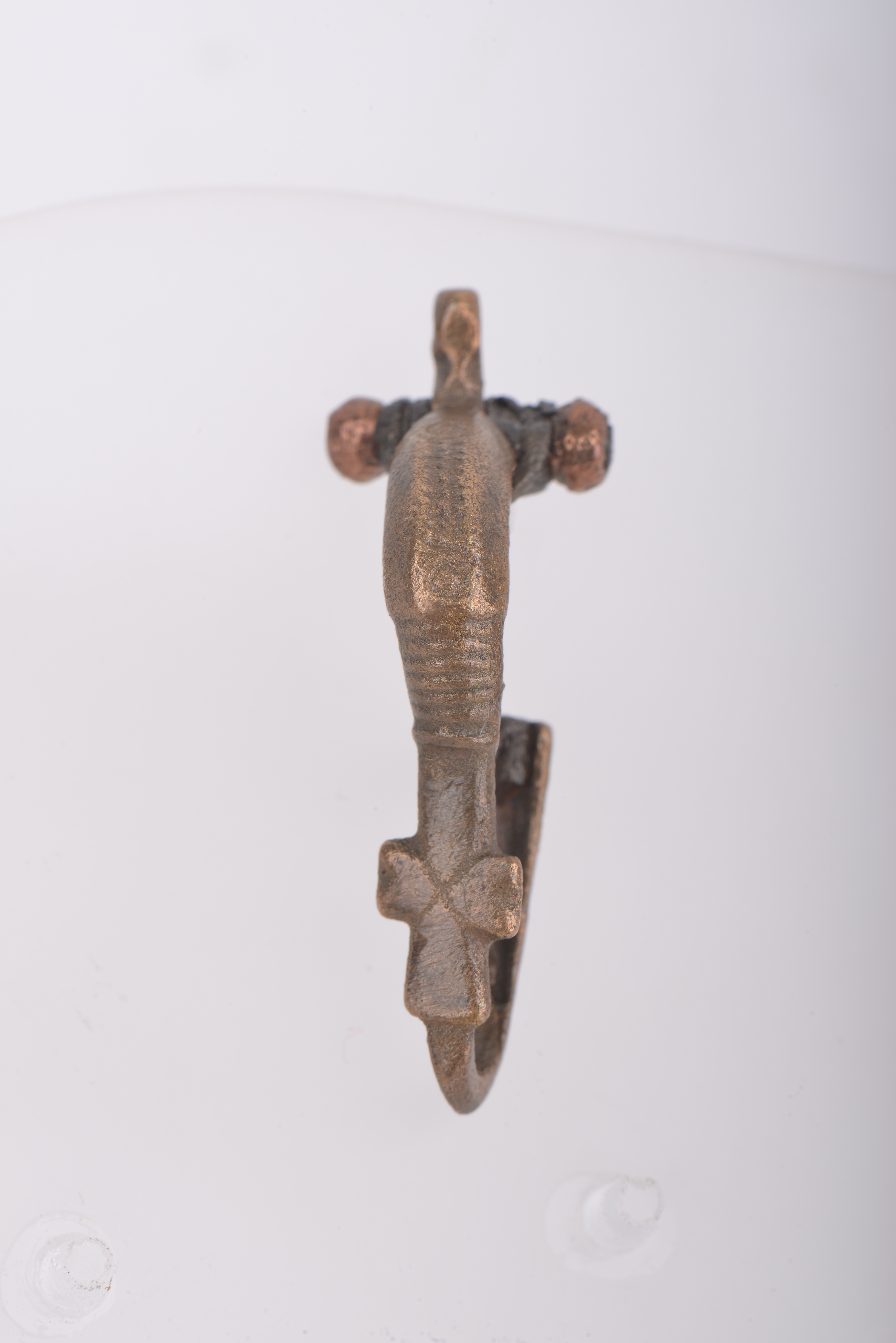 Srpski (latinica): Fibula od bronze sa posuvraćenom nogom iz perioda 5-og veka. Slučajni nalaz na lokalitetu Gradac u Gradašnici. Deo je Ranovizantijske zbirke Narodnog muzeja u Leskovcu.